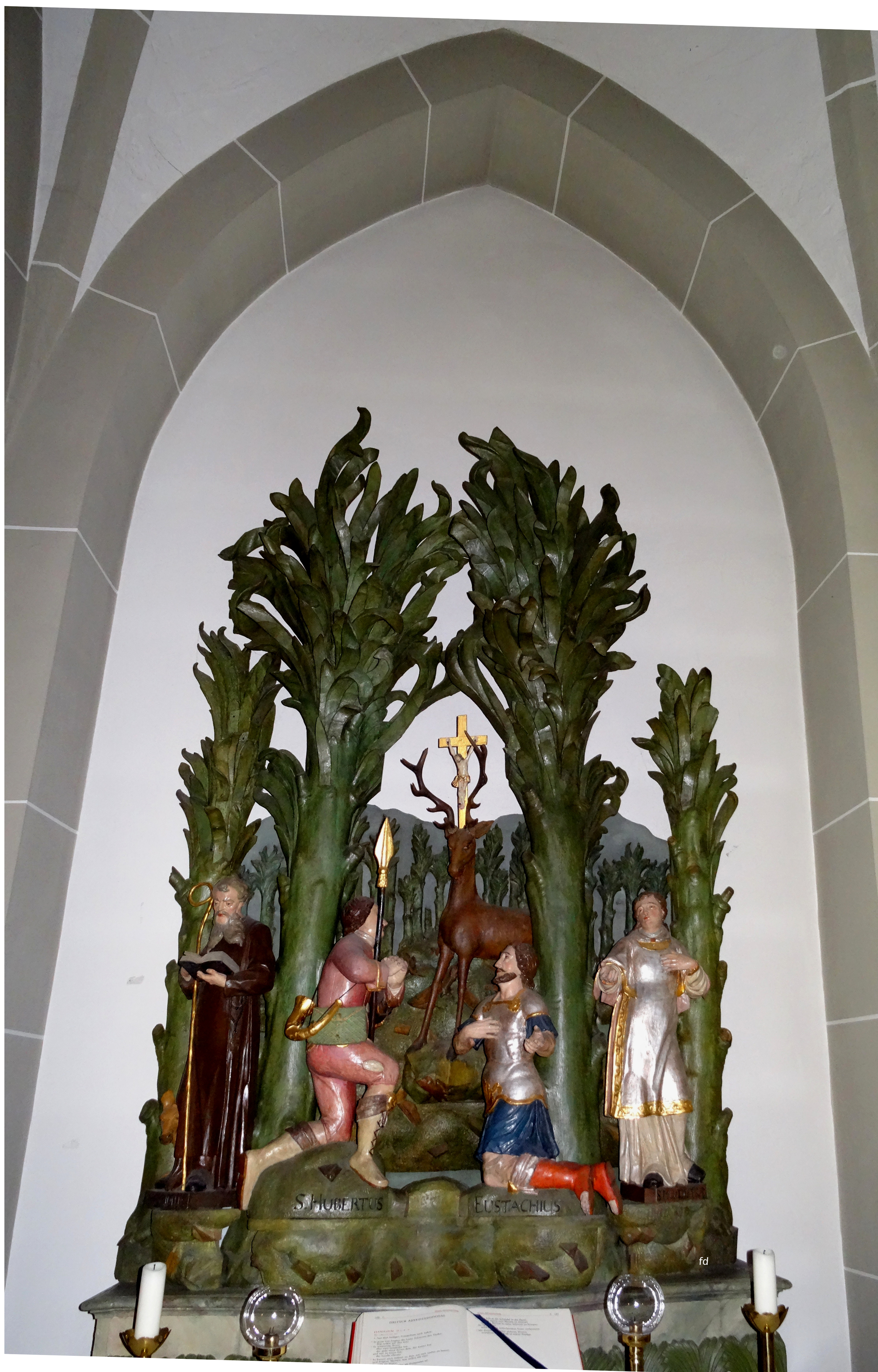 St. Christophorus (Hirschberg)Hubertus-Altar